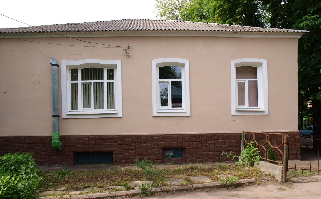 Полтава, ул.Комсомольская 37, до 1987 года - областная филармония